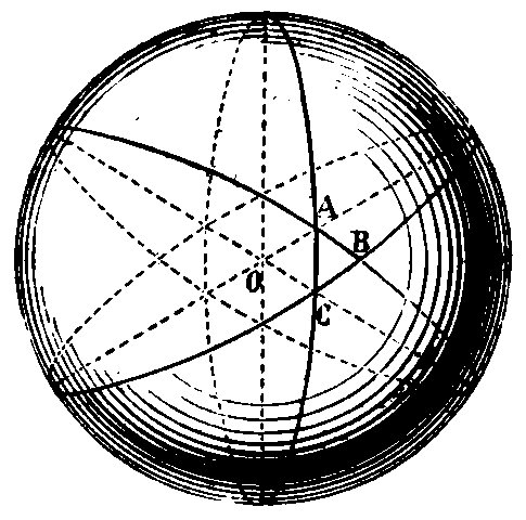 Fig. 10. — Triangle sphérique.